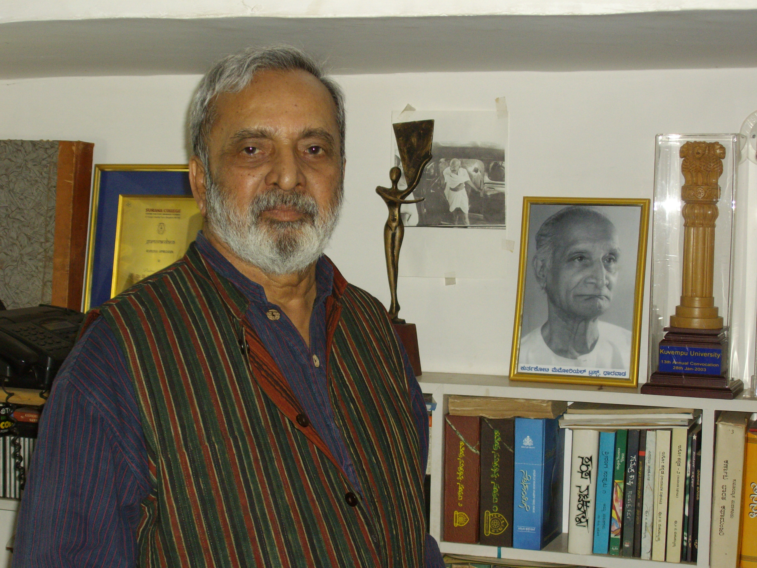 U R Ananthamurthy (Kannada: ಯು ಆರ್ ಅನಂತಮೂರ್ತಿ)